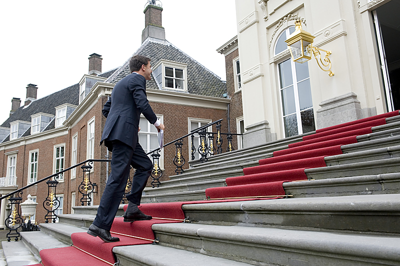 Minister-president Rutte arriveert maandagmiddag 1 november 2010 op Paleis Huis ten Bosch voor het wekelijks gesprek met de Koningin.